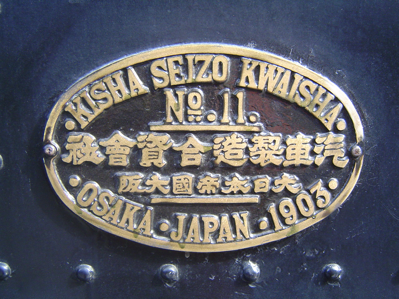 日本国有鉄道233号蒸気機関車の銘板（汽車製造）